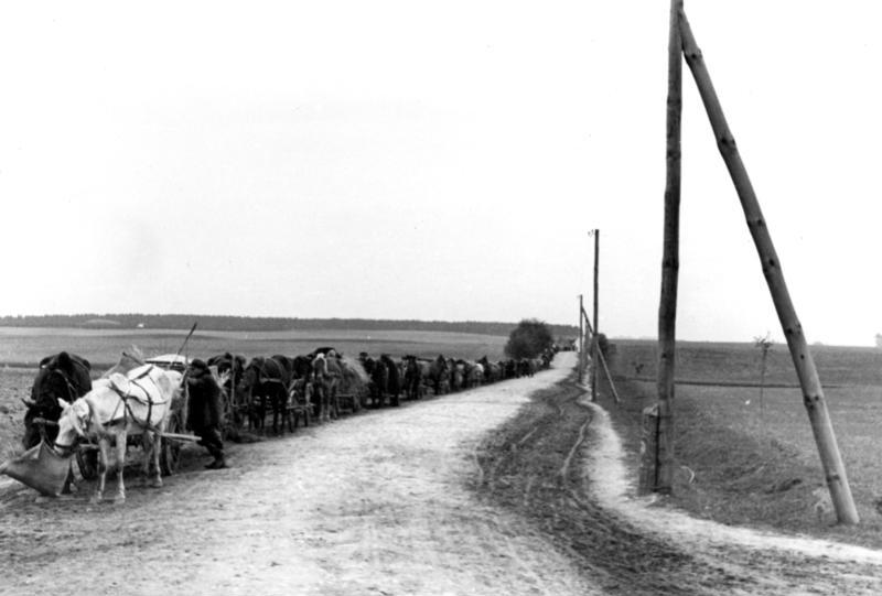 Polen, Umsiedlertreck Umsiedlung Cholmer Land: der Treck hält kurze Rast Polen. Kurze Rast auf dem Treck. Mit ihrer ganzen Habe ziehen diese volksdeutschen Umsiedler aus Cholm in das Grossdeutsche Reich - das ihnen neue und deutsche Heimat wird. [Polen.- Deutschstämmige Umsiedler auf dem Weg ins Deutsche Reich.]